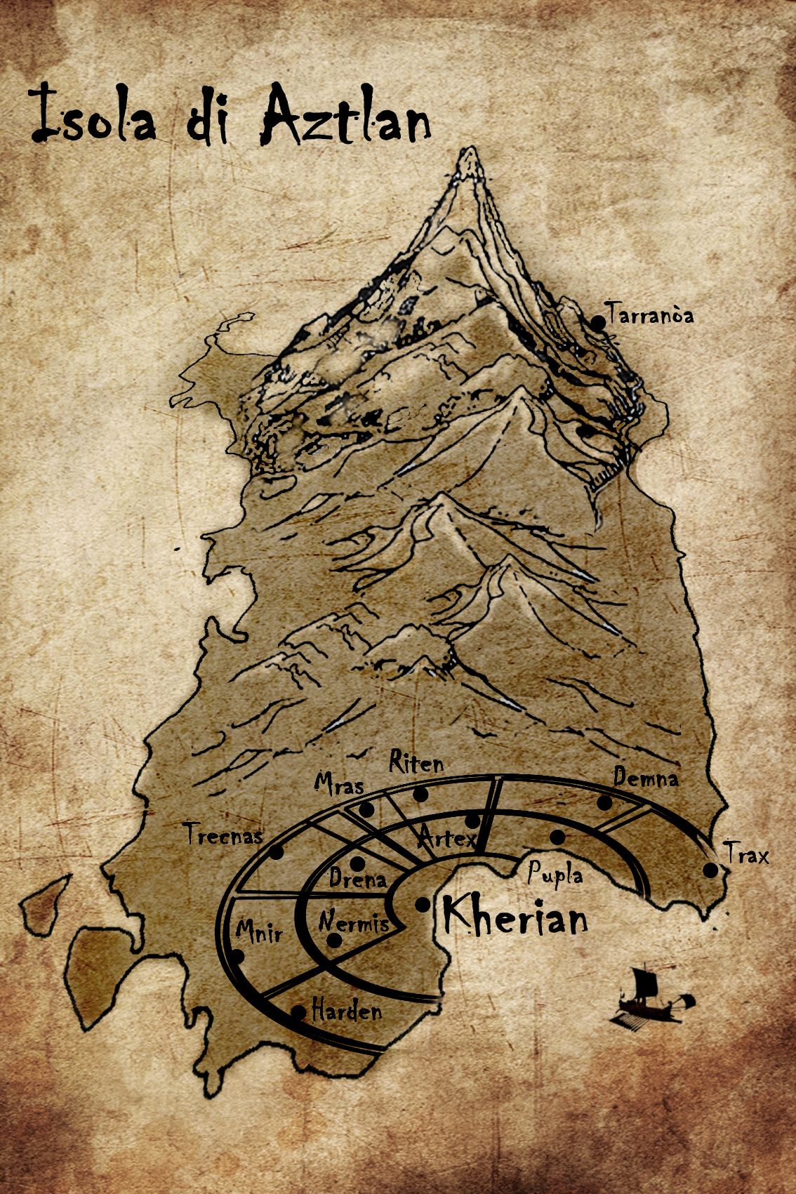 Mappa dell'isola di Aztlan descritta nel libro Alxuvaisera, di Mauro Ticciati